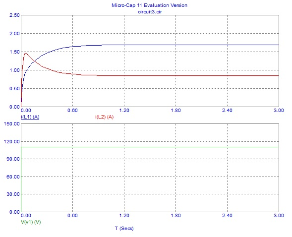 Gráfico utilizando Sotware de domínio público chamado Microcap 11